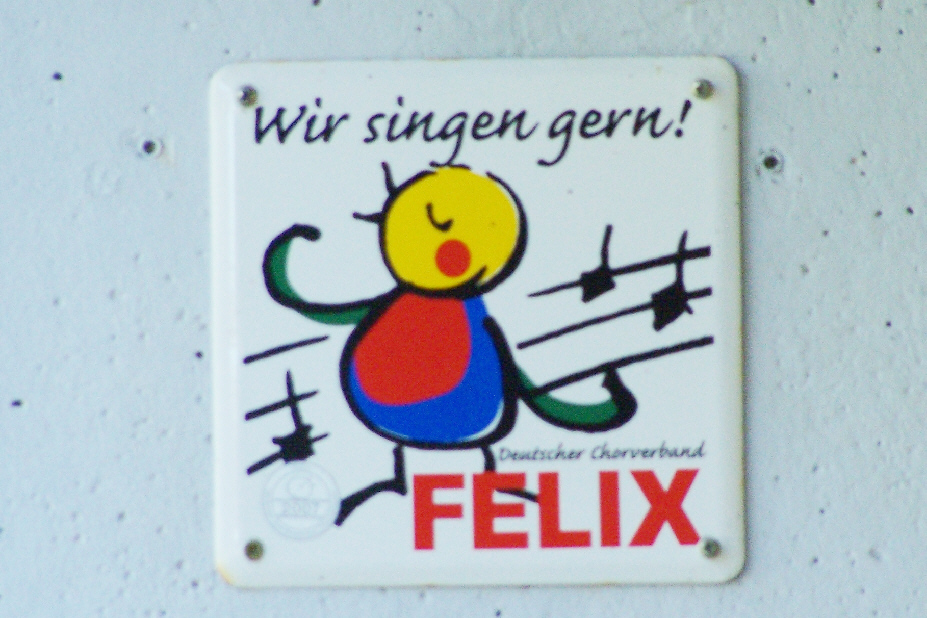 Die mit einer Felix-Plakette ausgezeichneten Kindergärten fördern das Singen und die Musikalität der Kinder.